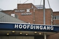 Delfzicht Ziekenhuis Delfzijl